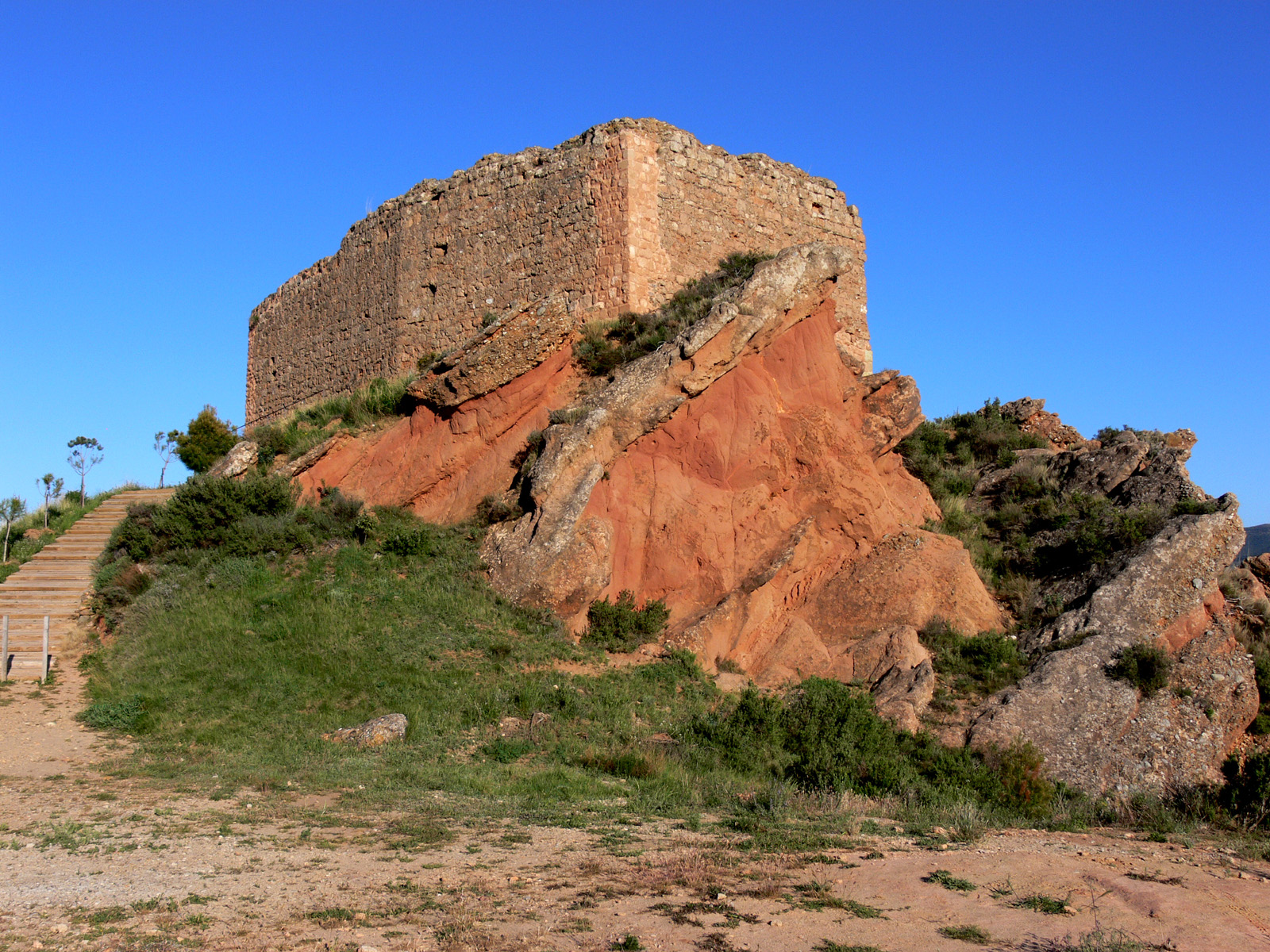 Castillo de Herce, La Rioja - España.